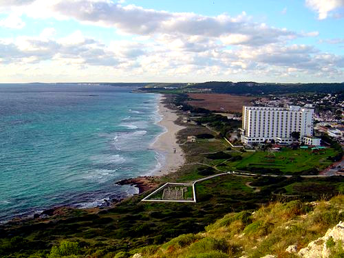 Platja de Son Bou, a Alaior (Menorca). En primer pla, la basílica paleocristiana de Son Bou.